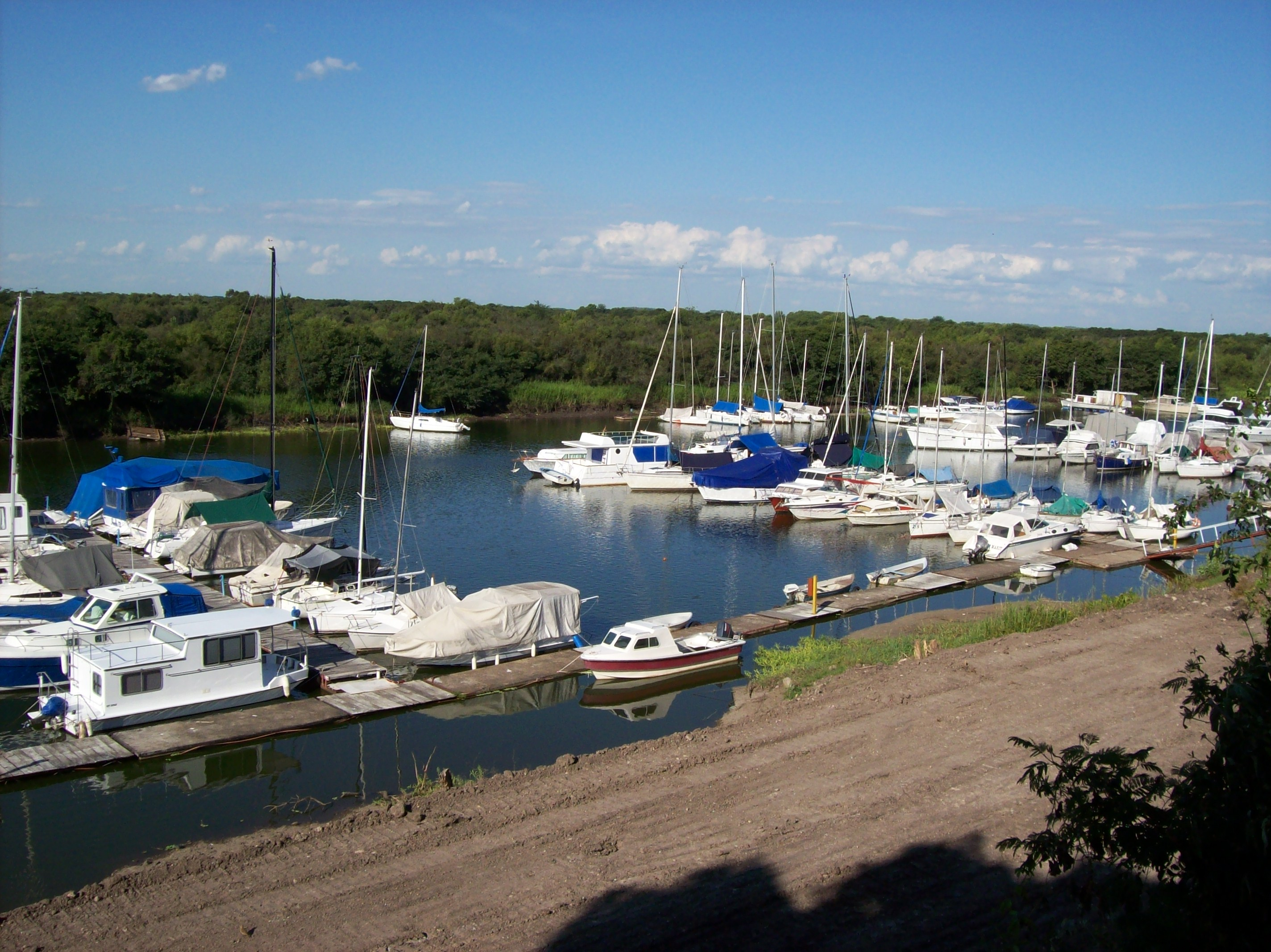 Barcos en el Yatch Club Entrerriano ubicado en el Arroyo el Molino, Concepción del Uruguay, Entre Ríos, Argentina.